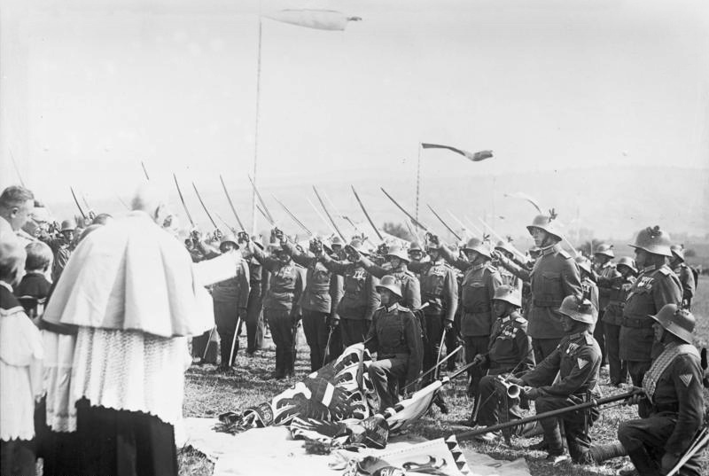 Fahnenweihe bei der oesterreichischen Armee im Burgenland! Der Geistliche segnet die Fahnen der I. oesterreichischen Brigade in Mattersburg im Burgenland.